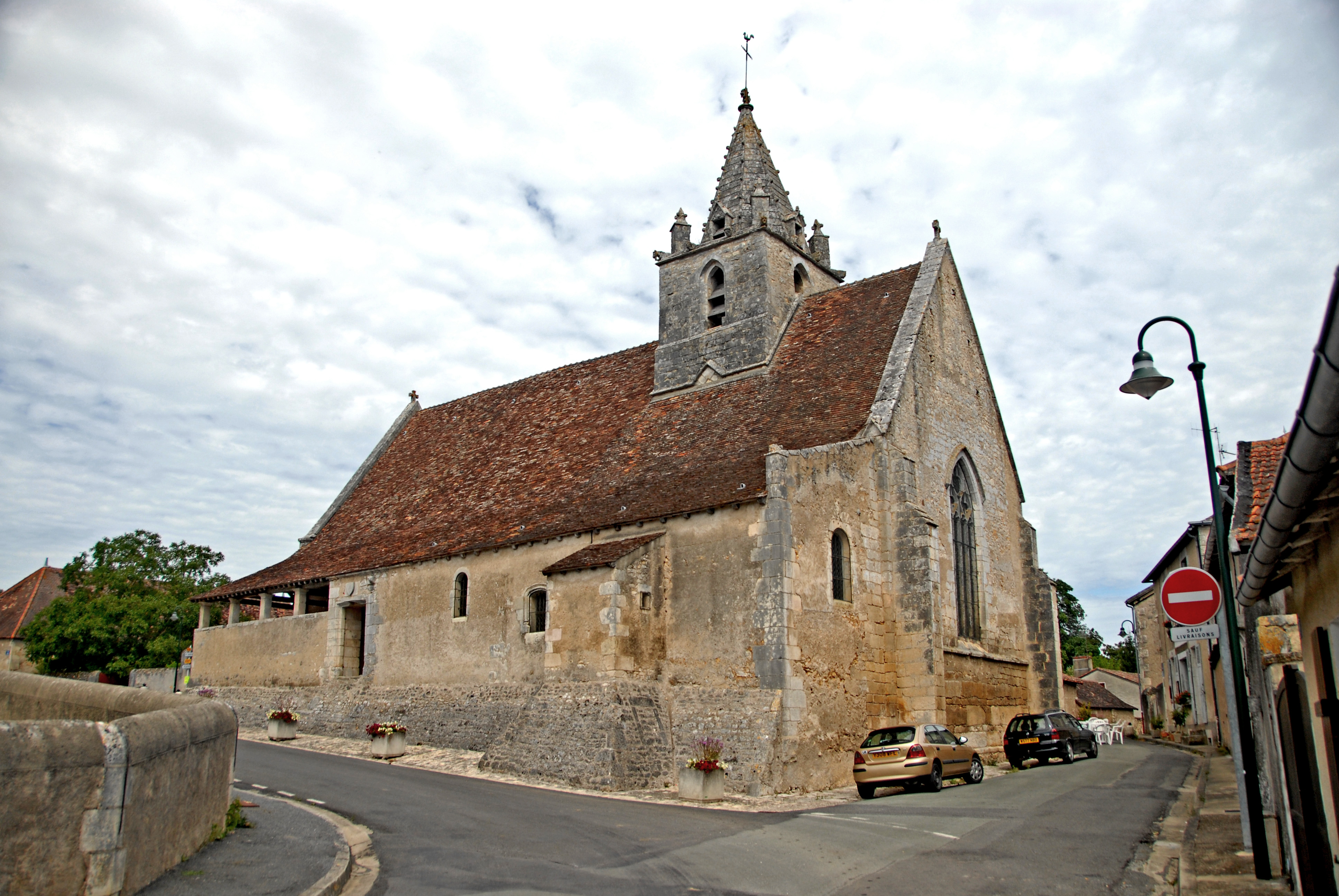 Kirche von SO